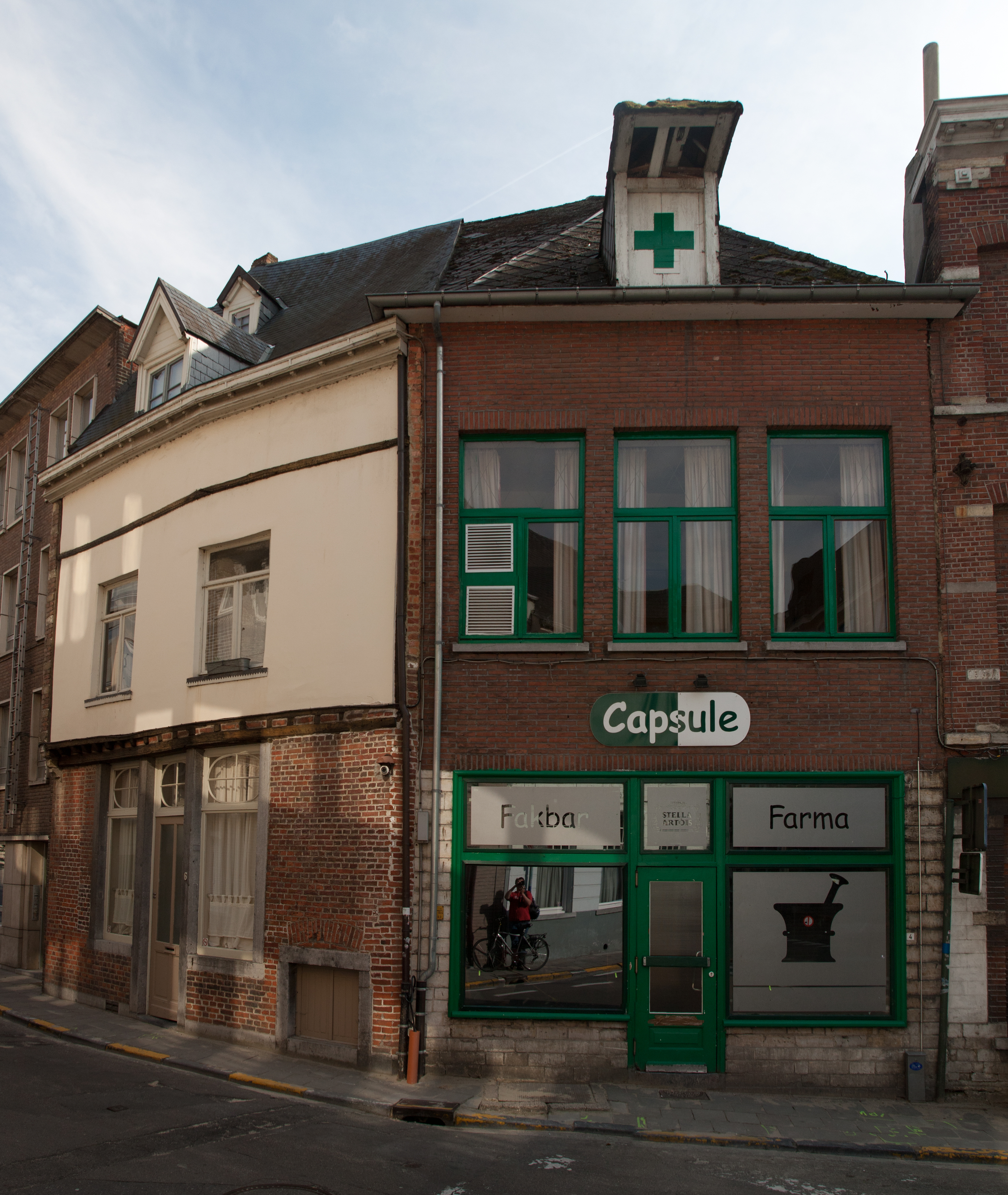 Parkstraat 4 - 6 te Leuven